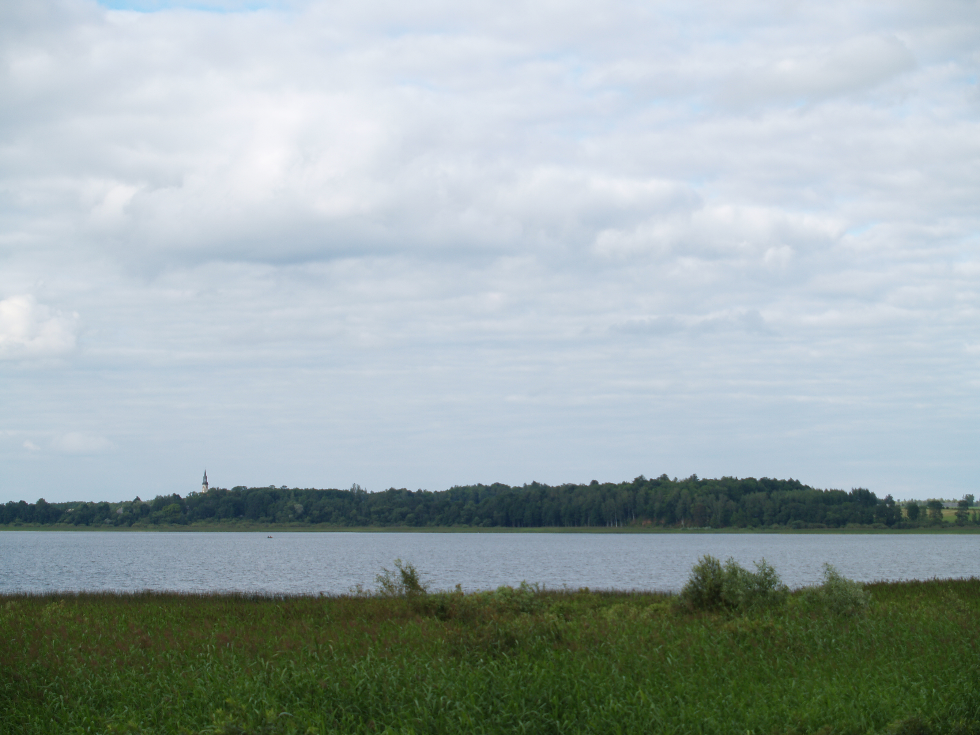 Asti järv ehk Burtnieki järv. Foto on tehtud Burtnieki poolt üle järve kiriku suunas.